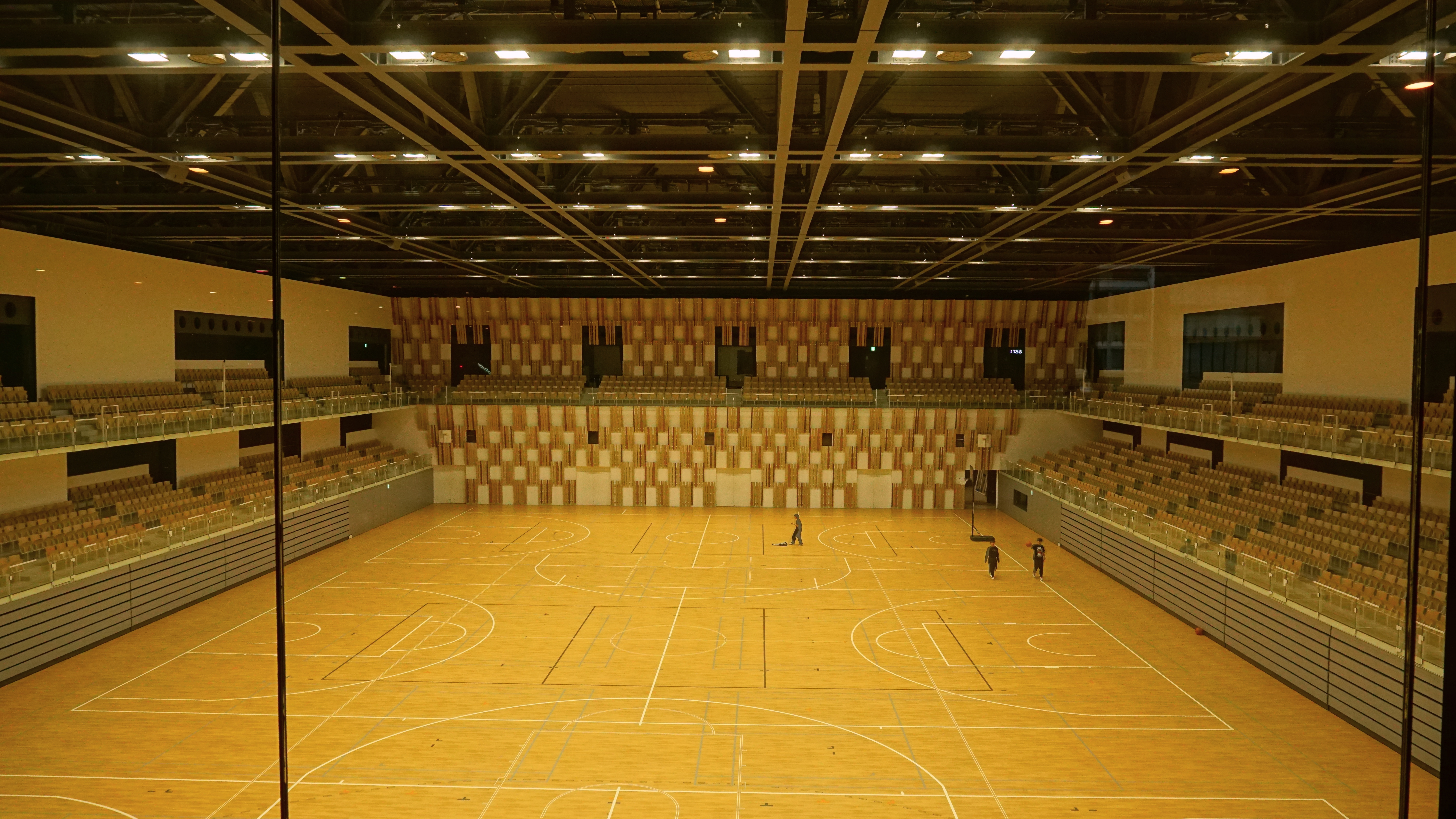 長岡シティホールプラザ・アオーレ長岡、アリーナ部分。Bリーグ・新潟アルビレックスBBのホームアリーナである。